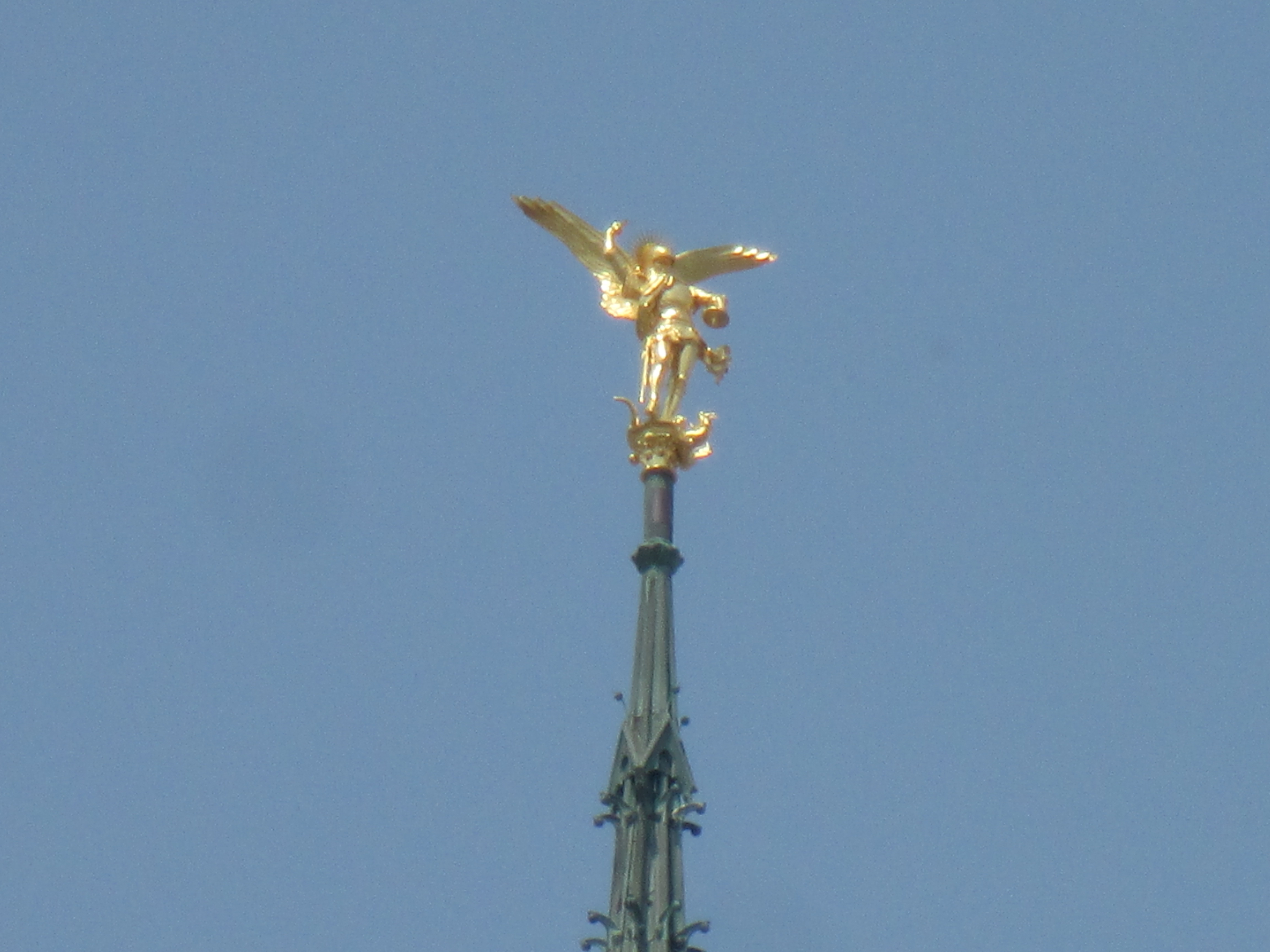 Mont Saint-Michel